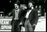 fotografía de la película By the Sea (1915) de Charles Chaplin.